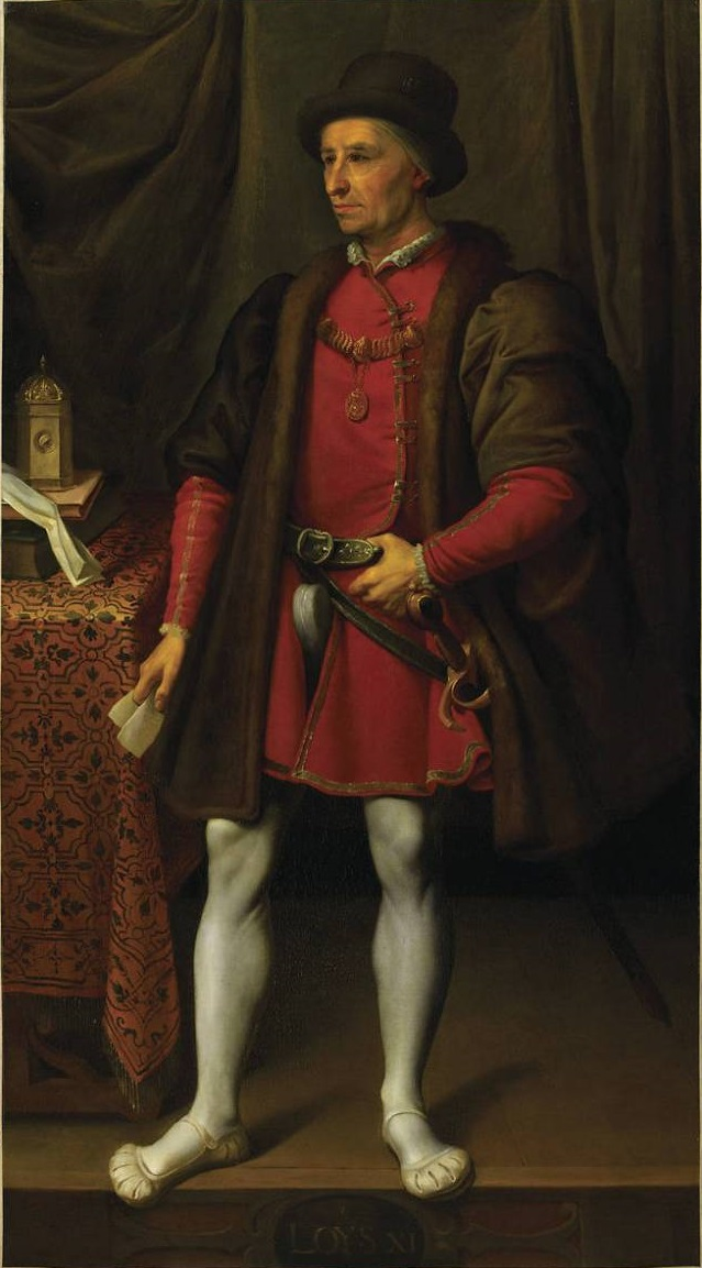 Copie d'après un original jadis au palais royal; commandé par Louis-Philippe pour le musée historique de Versailles en 1836